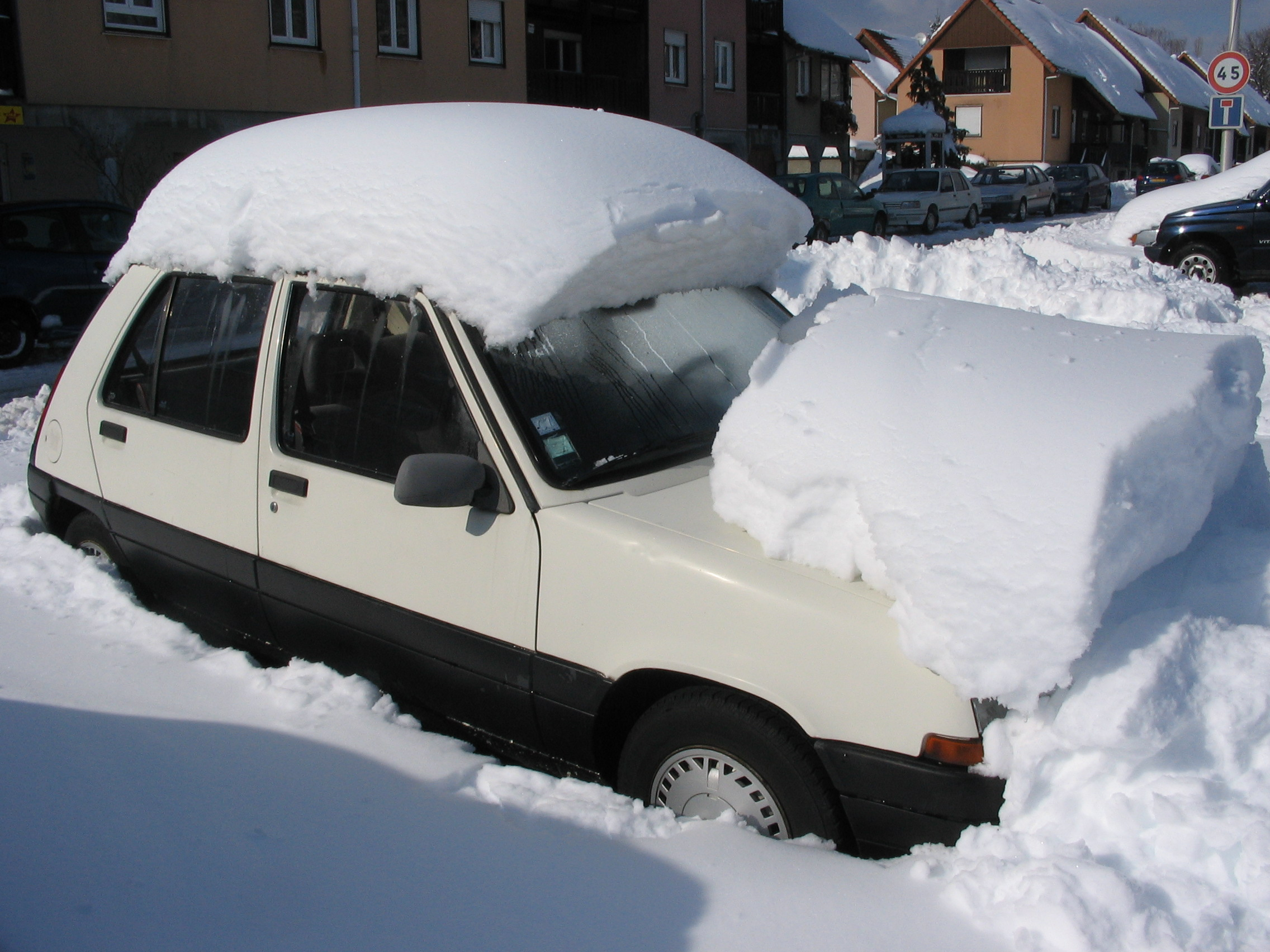 R5 sous la neige près de l'étang des Forges à Belfort. 05/03/2006. Record d'enneigement pour un mois de mars à Belfort.